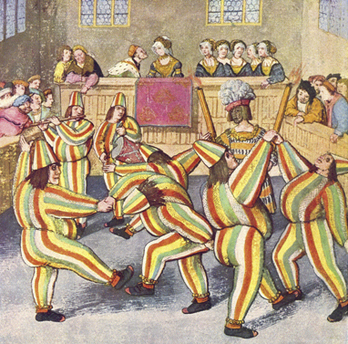 Freydal, fol. 164, Mummerei